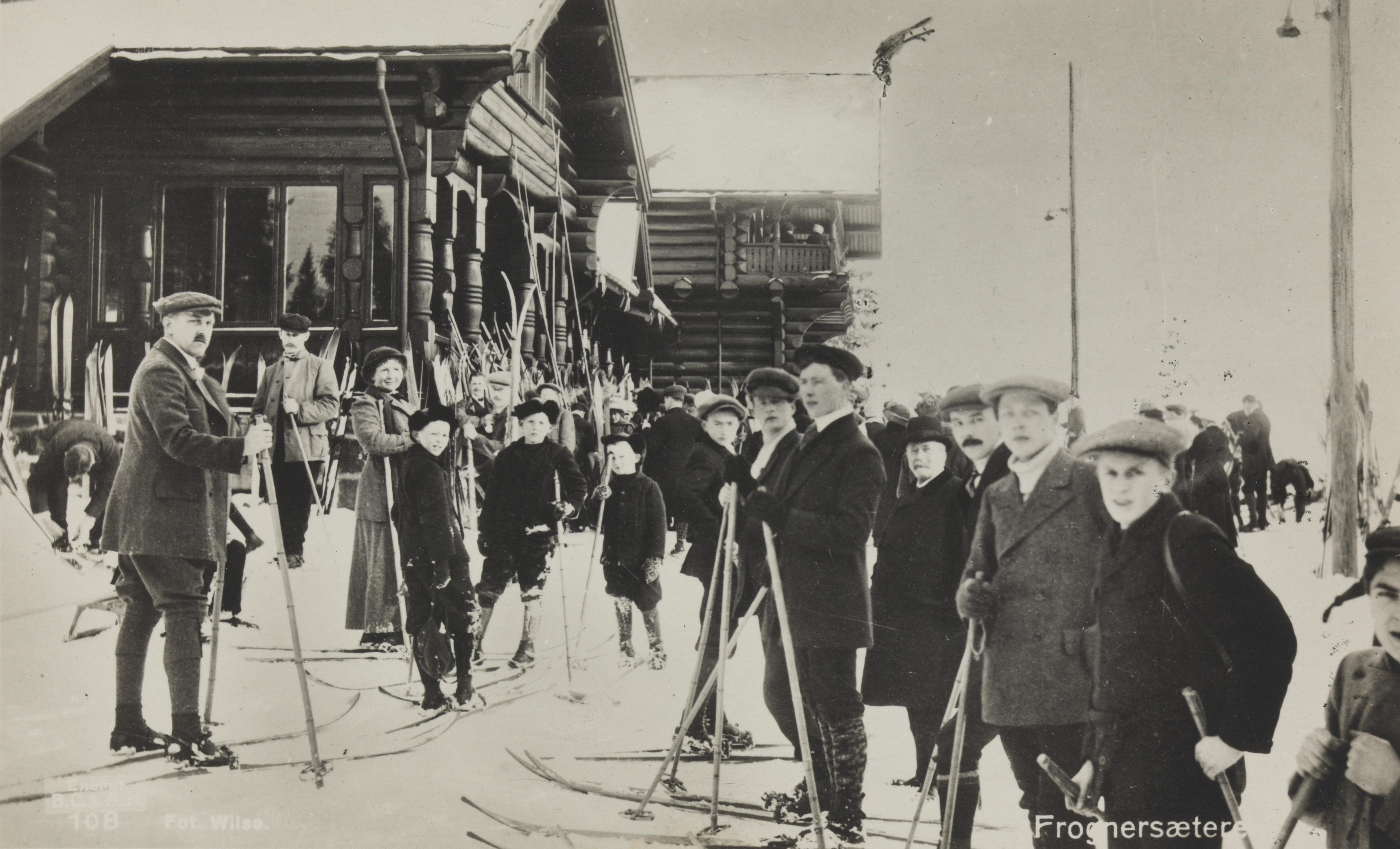 Bildet er hentet fra Nasjonalbibliotekets bildesamling Frognerseteren, Oslo, Oslo